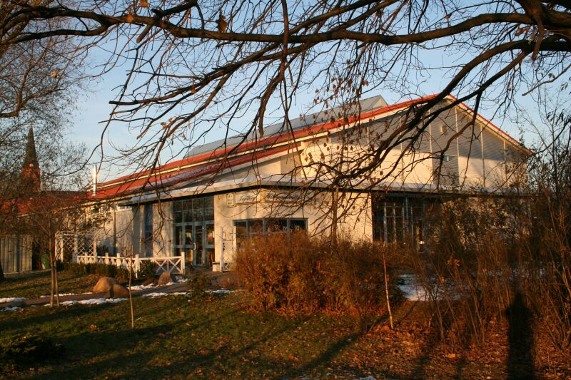 Irxleben: Wildparkhalle, Bild selbst gemacht Dez 2005